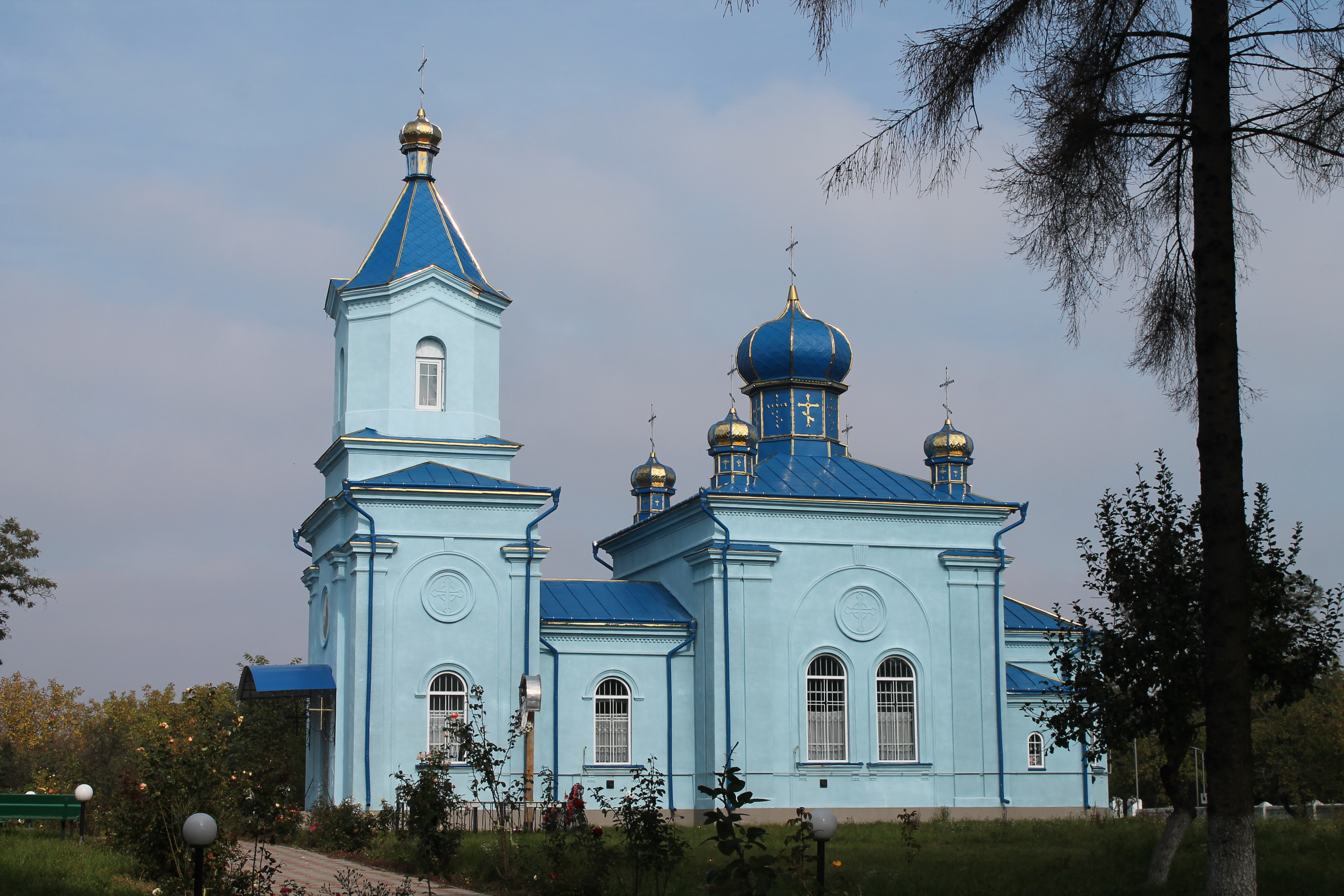 Дмитрівська церква (мур.), с. Ванчиківці